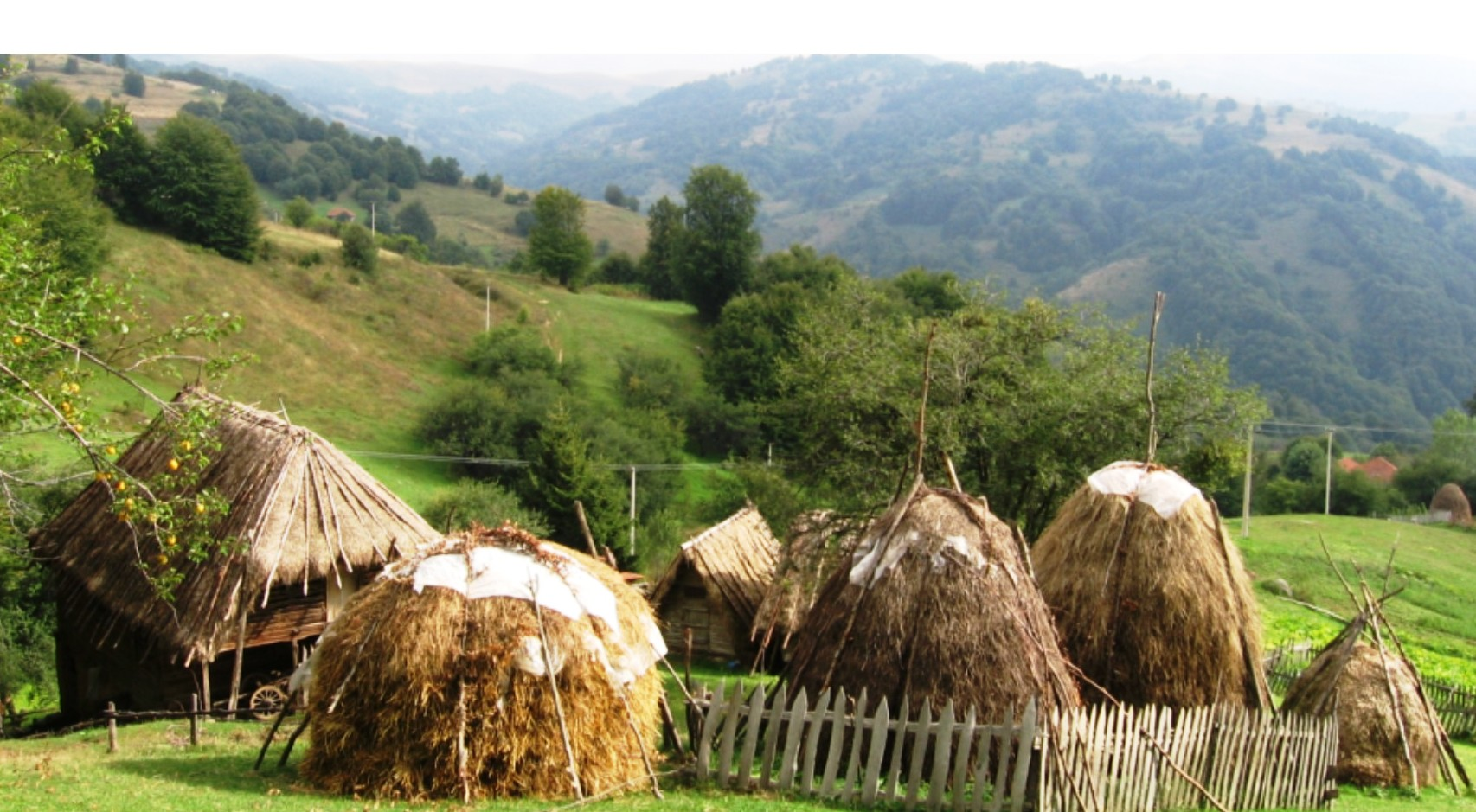 Ново Село.